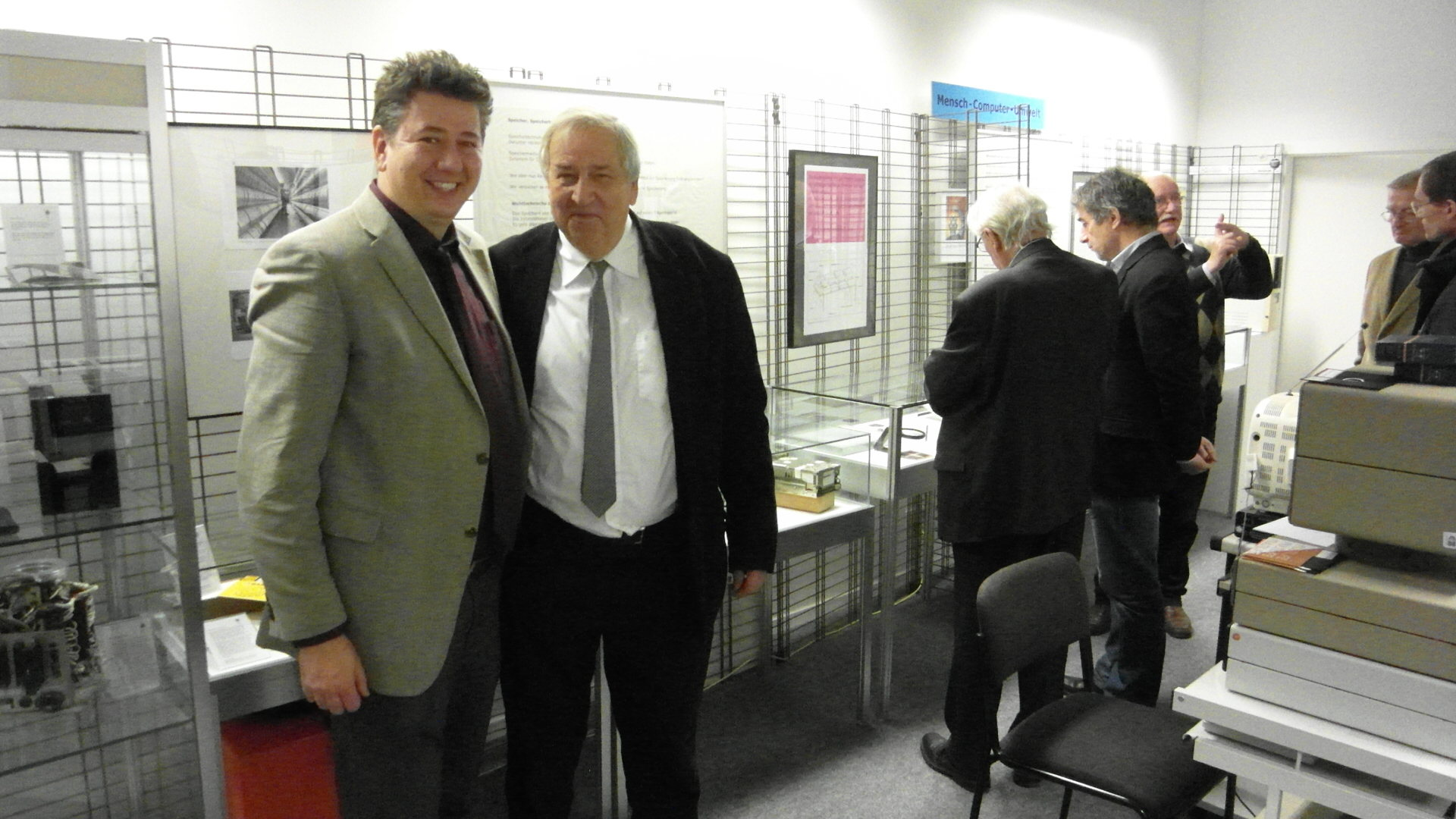 Fuchs-Kittowski, Klaus (rechts) und Sohn Frank im Computermuseum der HTW Berlin